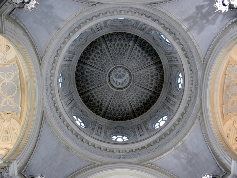 Venaria Reale - Vista interna della cupola nella Chiesa di S. Uberto